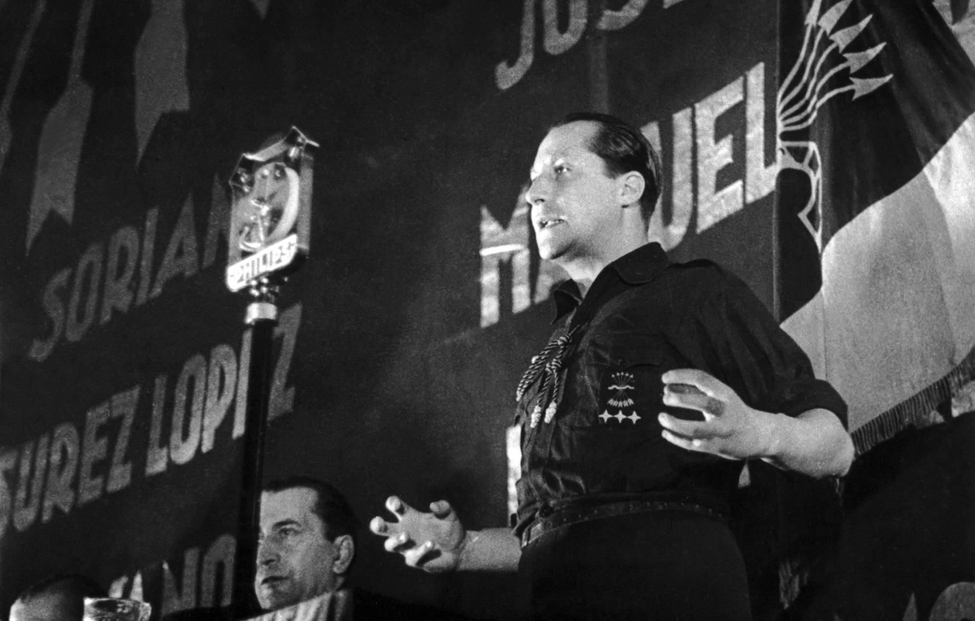 Il capo della Falange spagnola José Antonio Primo de Rivera (1903-1936), fucilato durante la guerra civile spagnola.